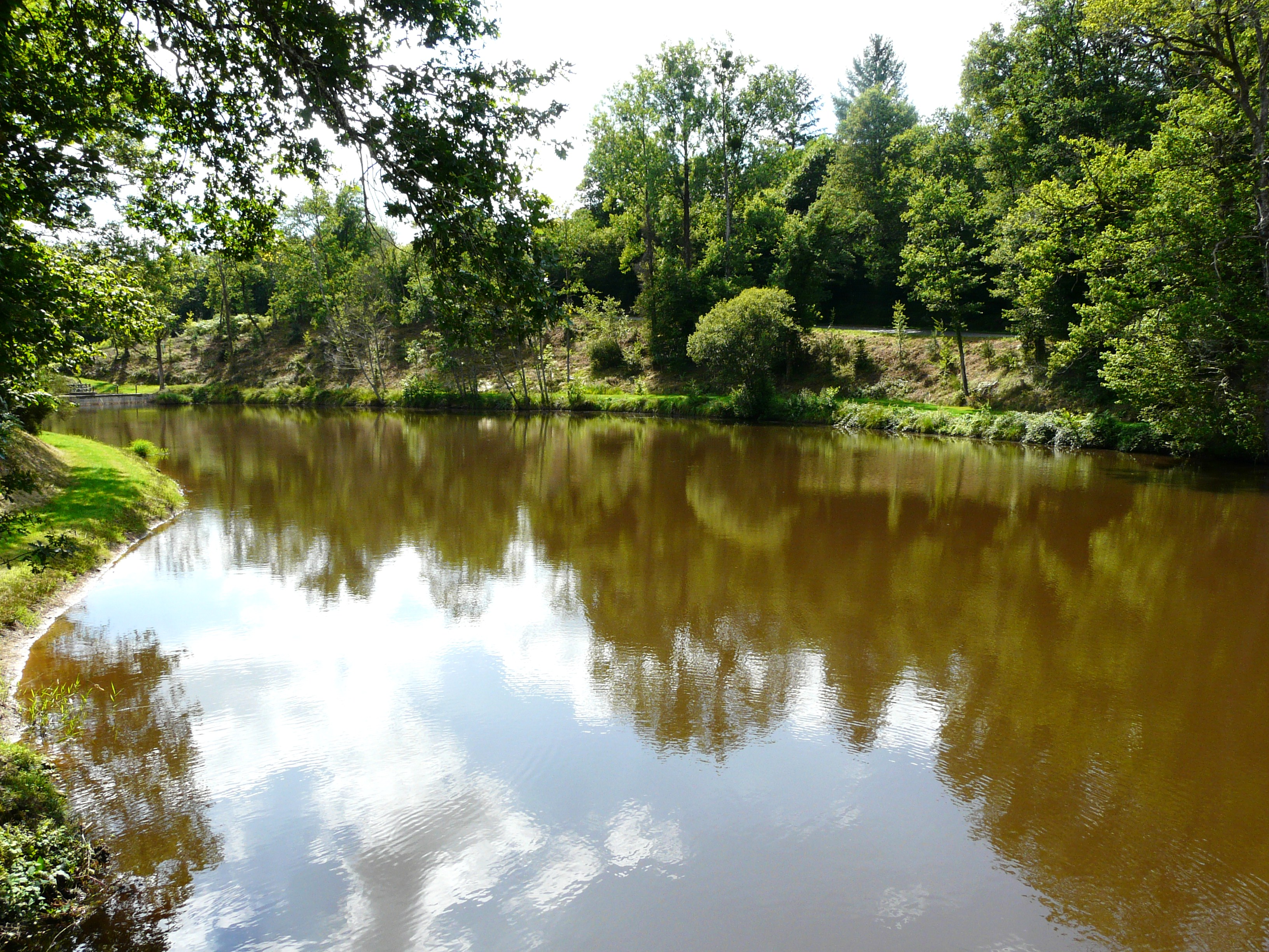 La partie aval de l'étang de Puyraud situé sur le Coly, Mialet, Dordogne, France.